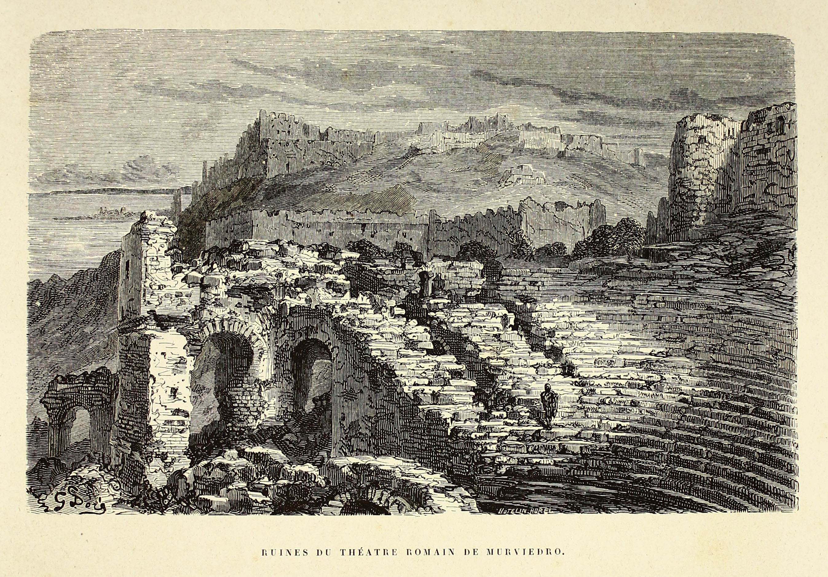 Autor: Davillier, Jean Charles, barón, 1823-1883 Descripción bibliográfica: L'Espagne / par Le Baron CH. Davillier ; ilustrée de 309 gravures dessinées su bois par Gustave Doré. - Paris : Librairie Hachette, 1874. - 799 p. : il. Materia: España- Geografía Materia: España- Usos y costumbres Ilustrador: Doré, Gustave, 1832-1883 Editor: Libreria Hachette Lugar de impresión: Francia, París Localización: Libro completo